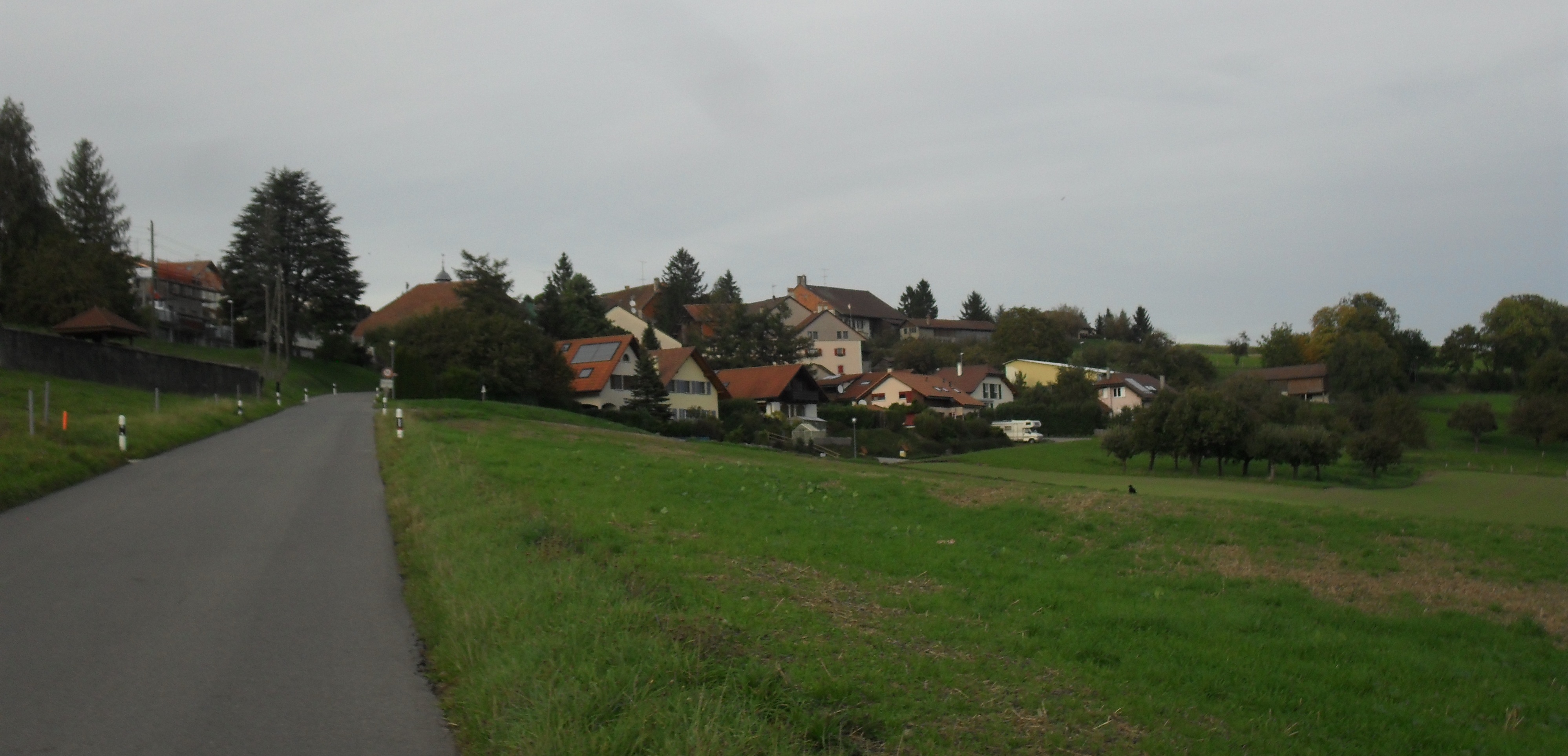 Chavannes-sur-Moudon vu depuis la Route de Moudon